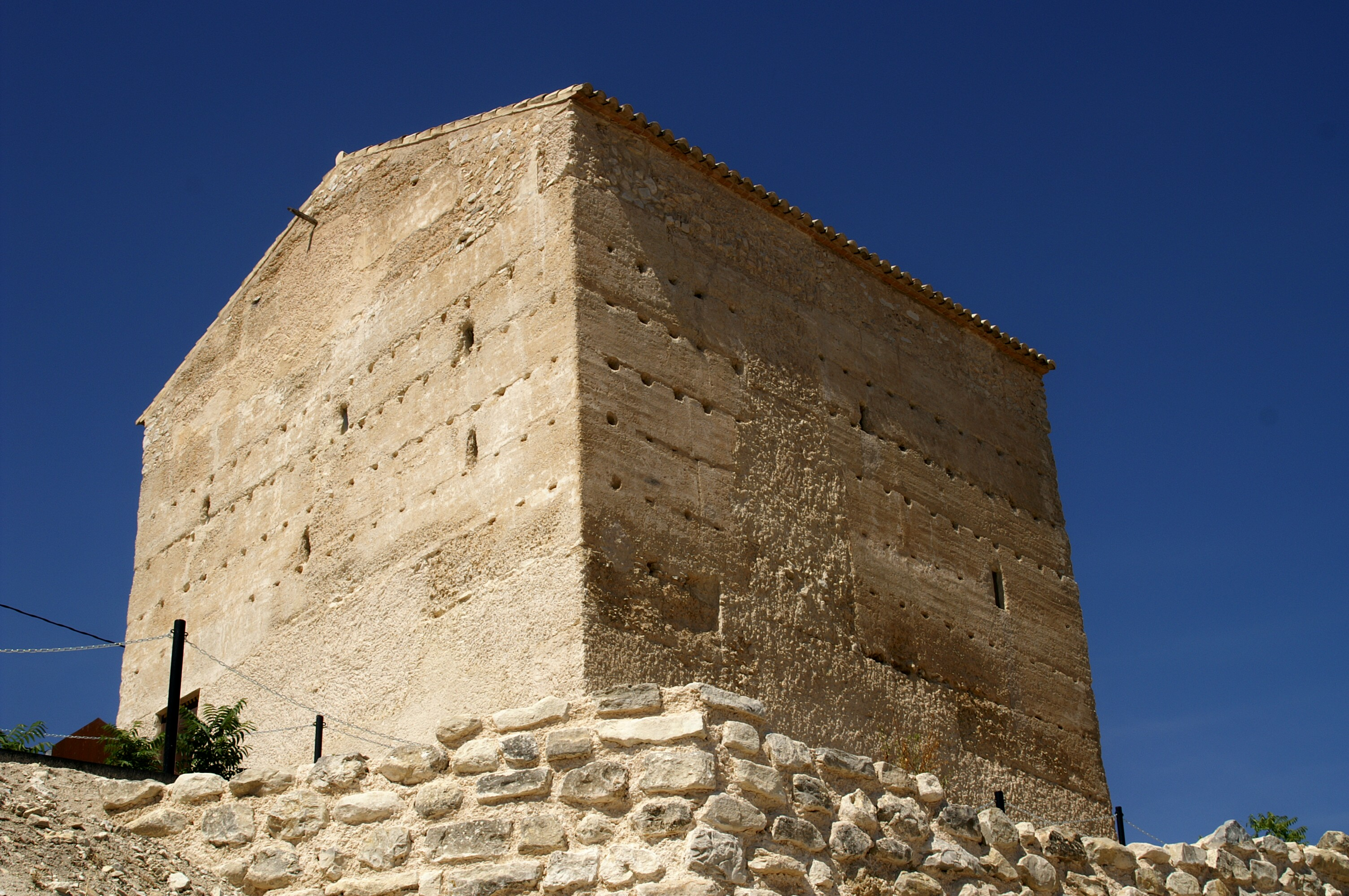 Torre de Maçanes, o Torre Gran (la Torre de les Maçanes, l'Alacantí, País Valencià)